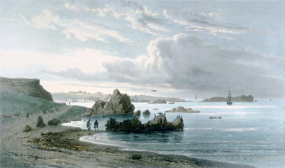 Rada de Cobija por Pierre Louis Philippe Alphonse Bichebois publicado en "Voyage autour du Monde executé pendant les années 1836 et 1837 sur la Corvette la Bonite"